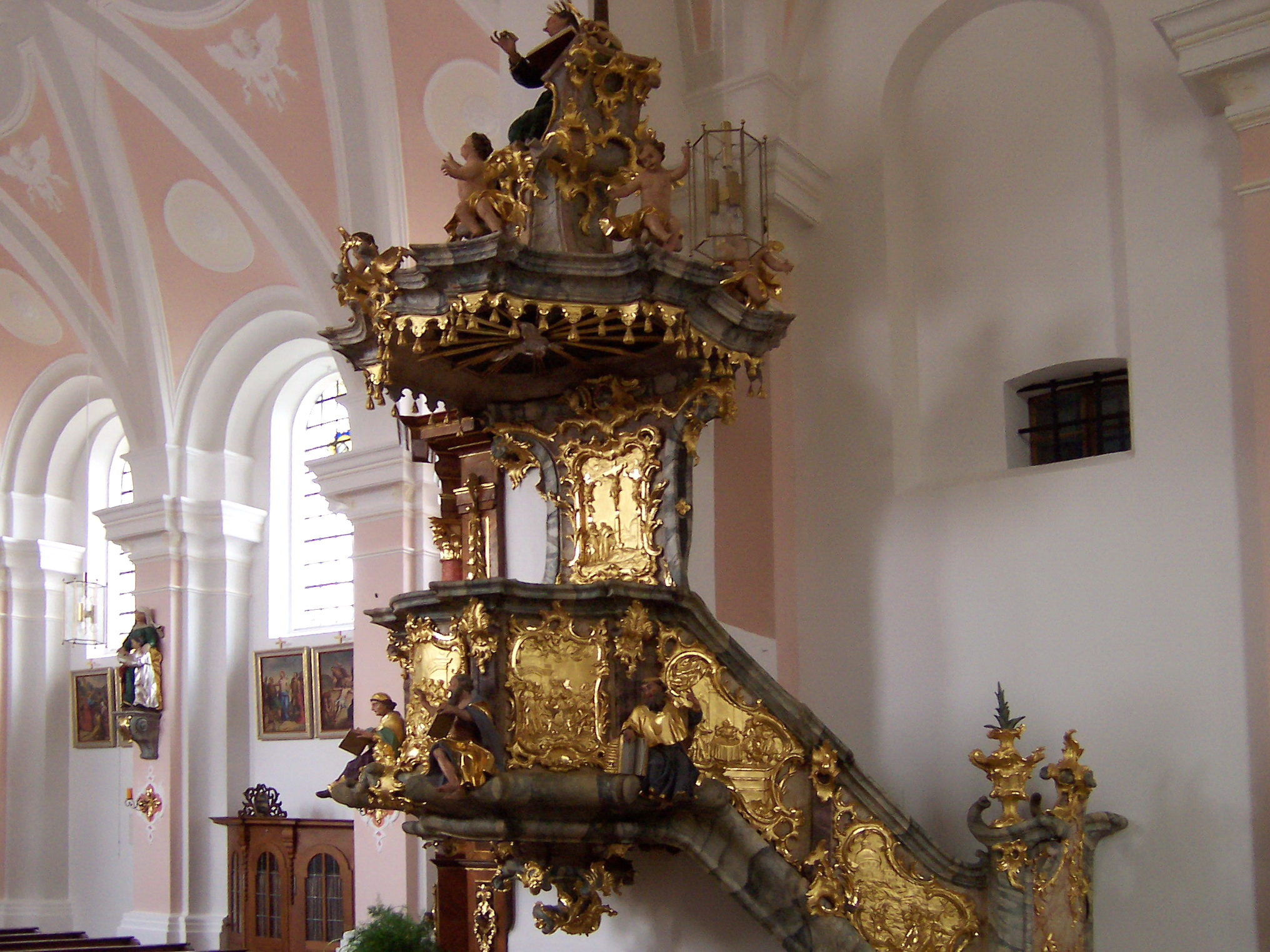 Mallersdorf-Pfaffenberg. Westen 82. Katholische Pfarrkirche Mariae Opferung. Die Kanzel von Mathias Obermayr um 1755. Dieses Meisterstück bayerischen Rokokos stand ursprünglich in der Kirche in Atting und wurde bei einer Renovierung 1859 für 175 Gulden nach Westen verkauft. Am Kanzelkorb werden die vier Kirchenväter Augustinus, Gregor, Hieronymus u. Ambrosius dargestellt. Den Schalldeckel bekrönt St. Johannes Evangelist..